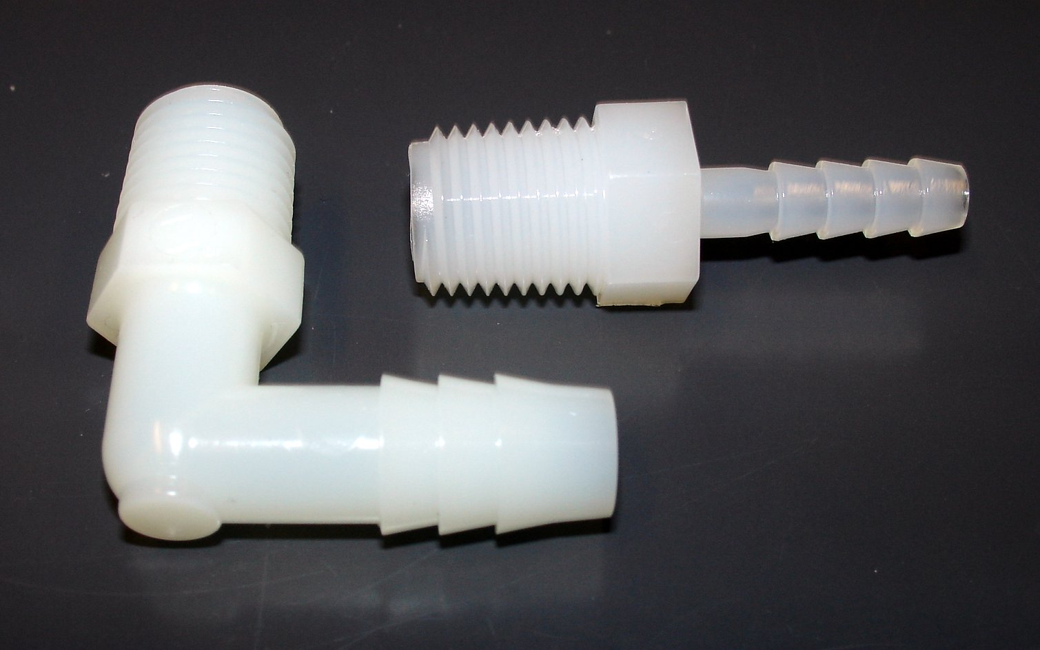 Dwa rodzaje oliwek laboratoryjnych (tzw. angielskich).